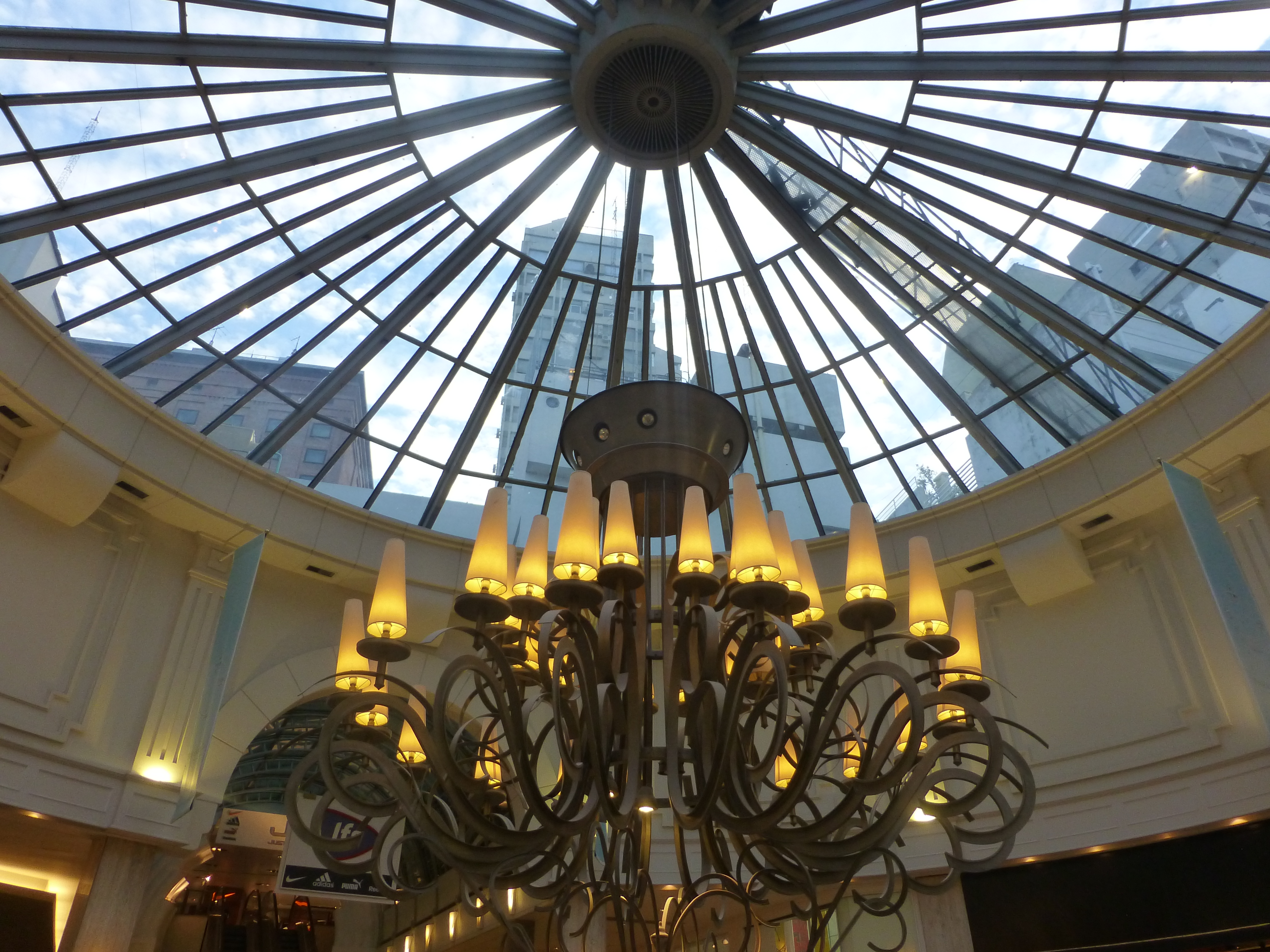 Araña y cúpula del tercer piso del Patio Bullrich.